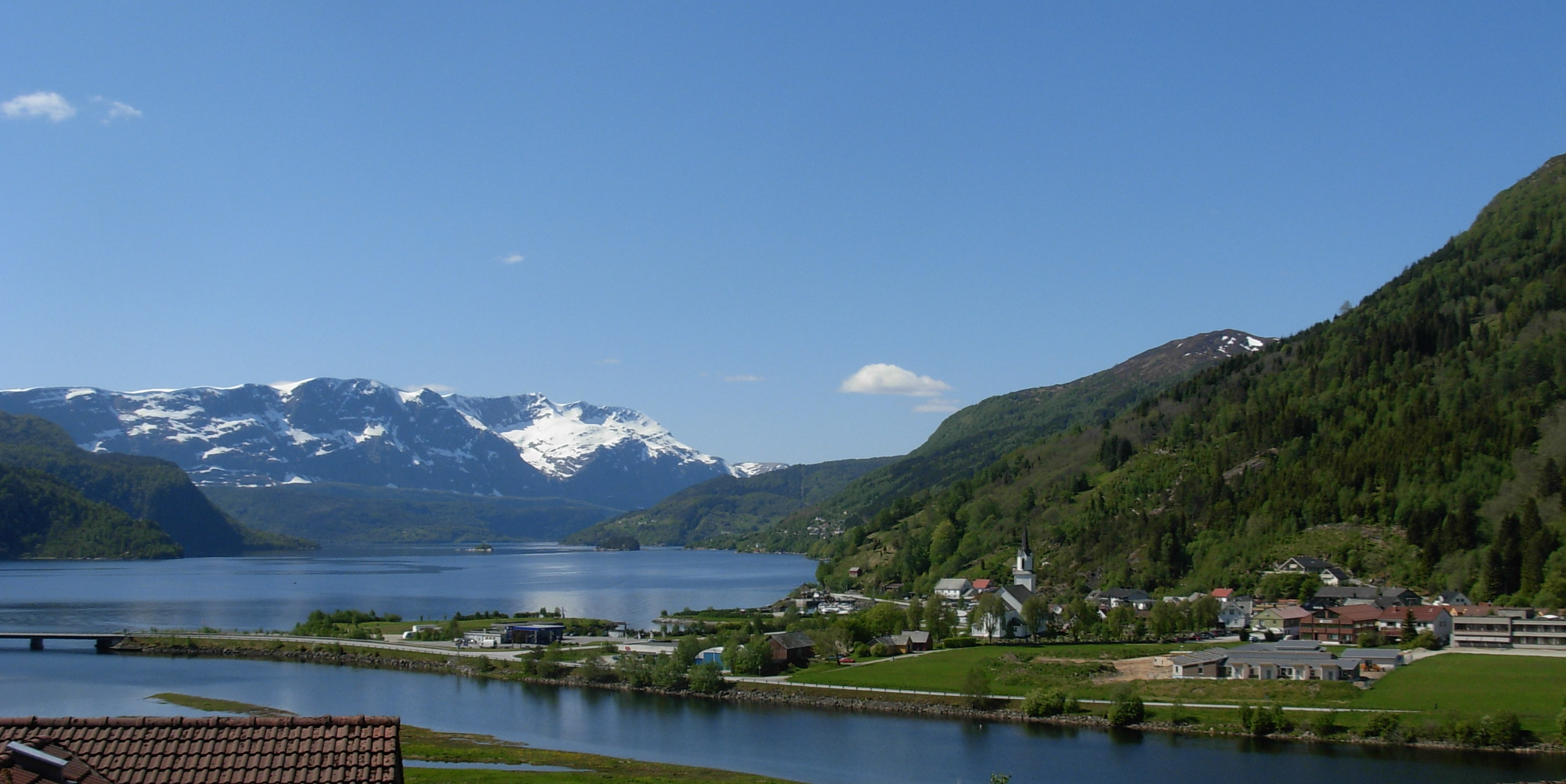 Naustdal village and Førde fjord, Sogn og Fjordane, Norway